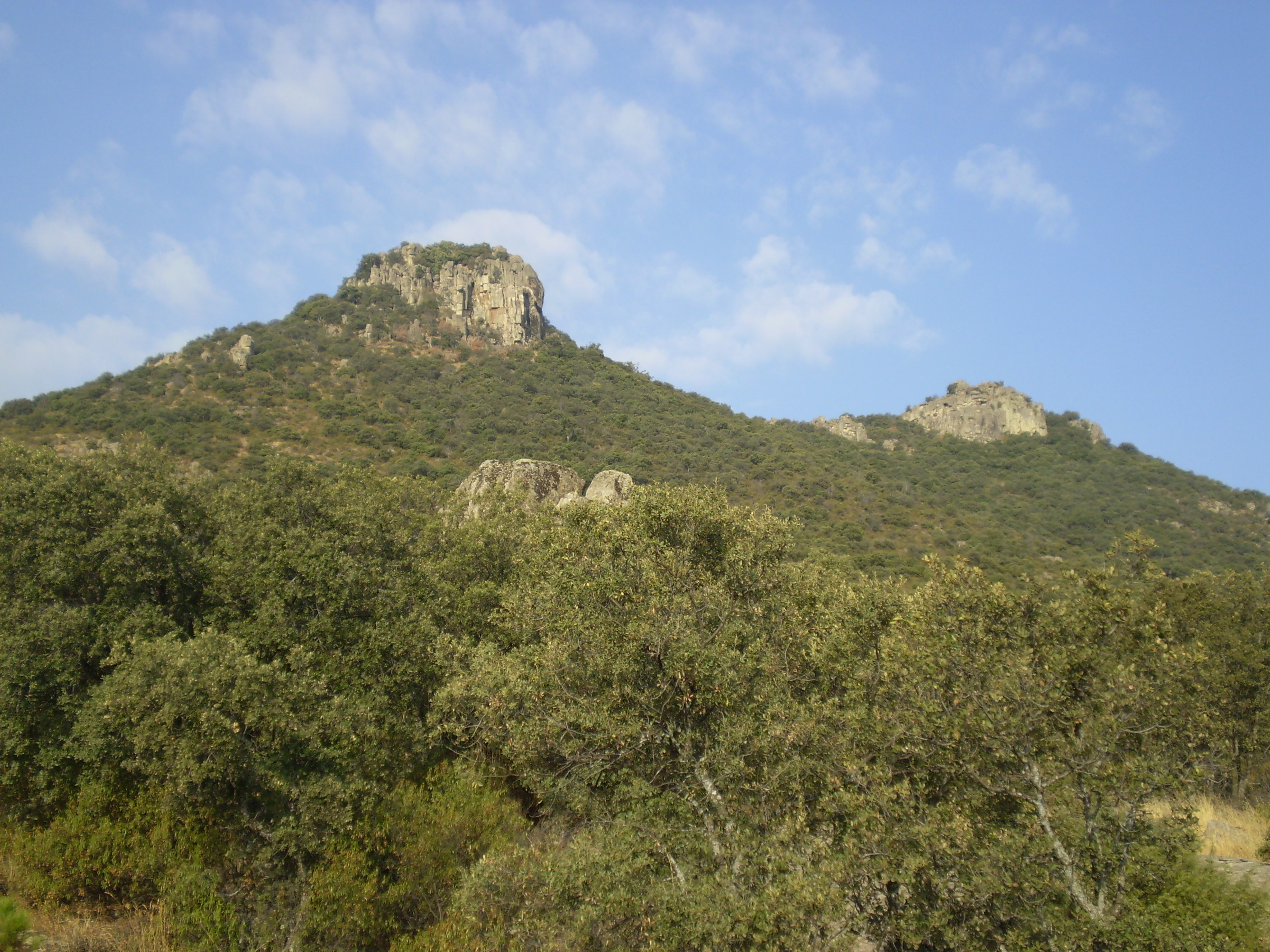 Los Picazos. Sierra del Hoyo (Sierra de Guadarrama, Community of Madrid, Spain)